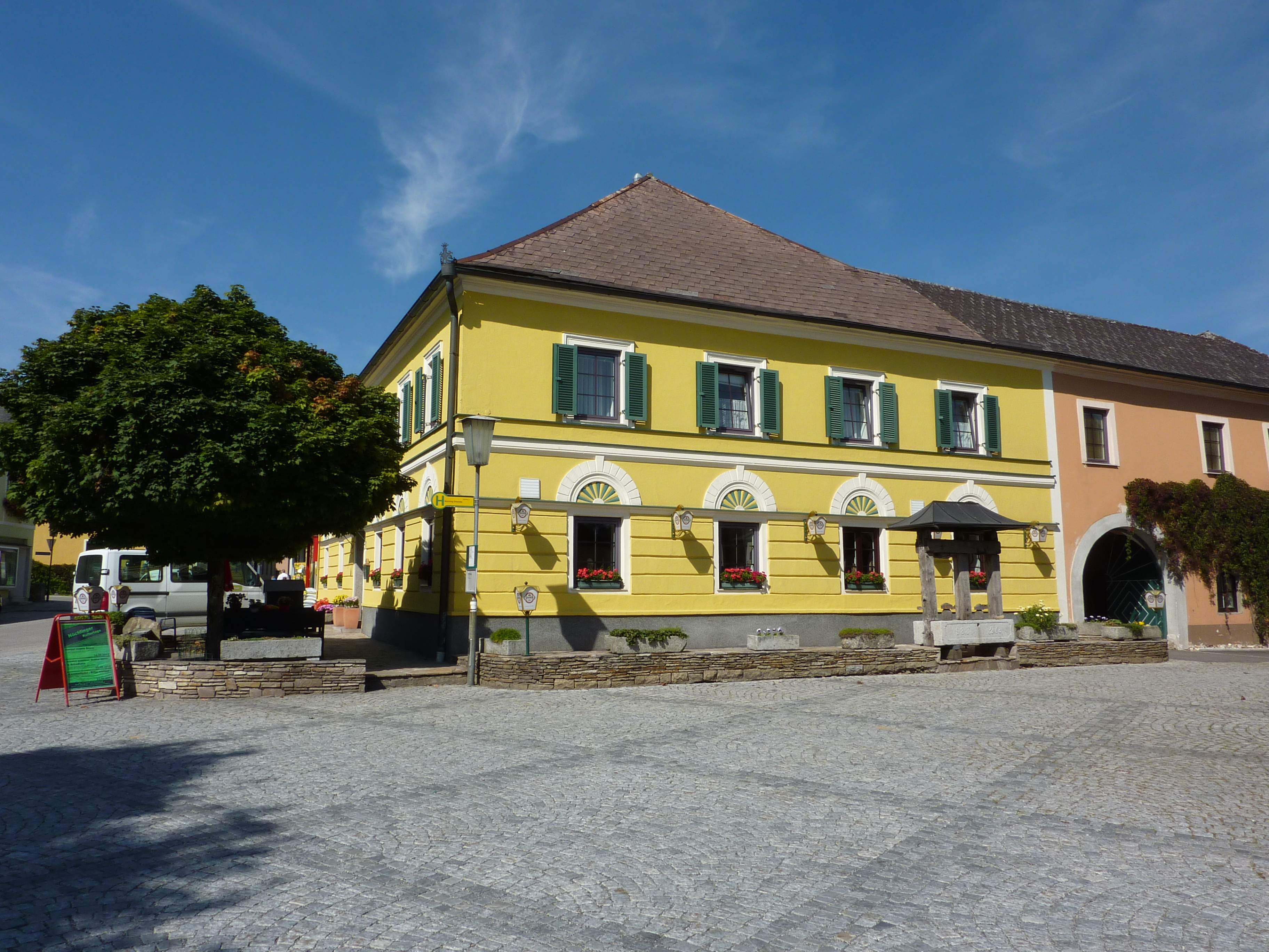 Gasthaus, Nöchling 2, 3, Niederösterreich